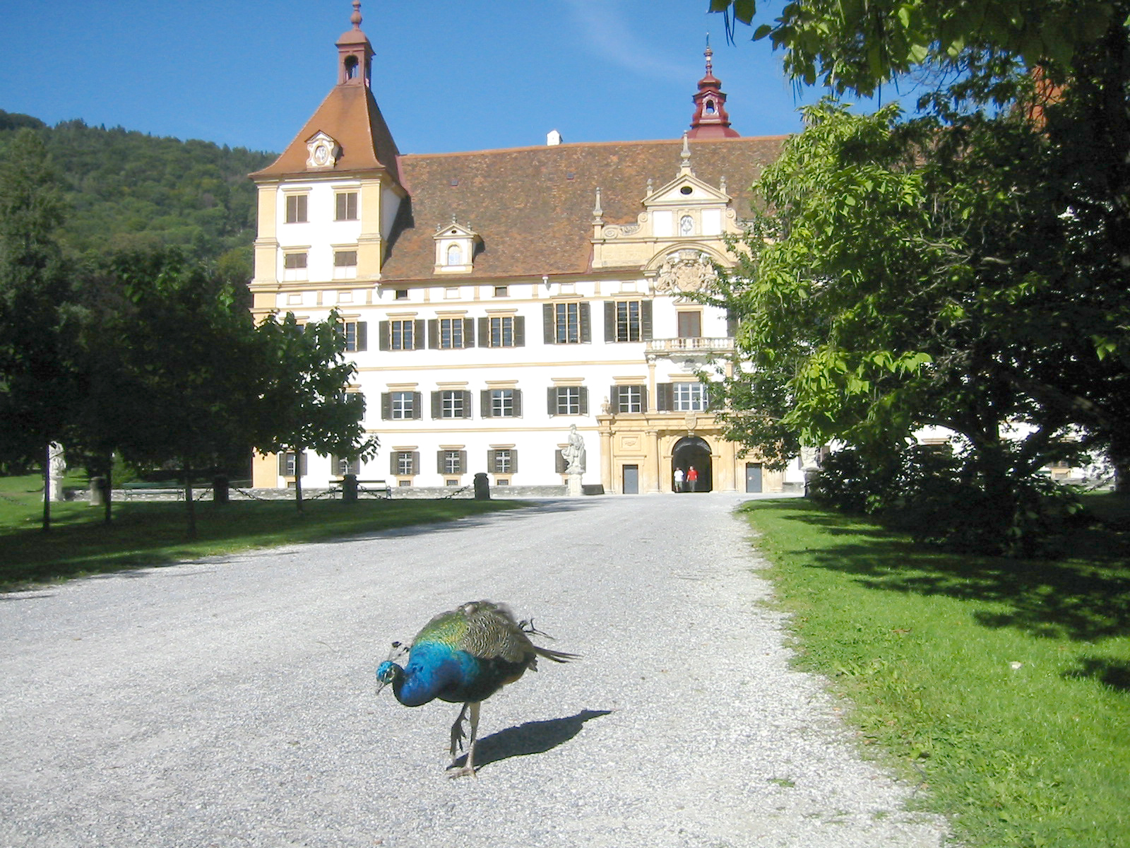 Schlosspark Eggenberg